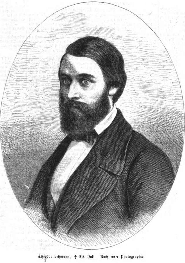 Theodor Lehmann, Jurist und deutscher Politiker (Schleswig-Holstein) im 19. Jh.